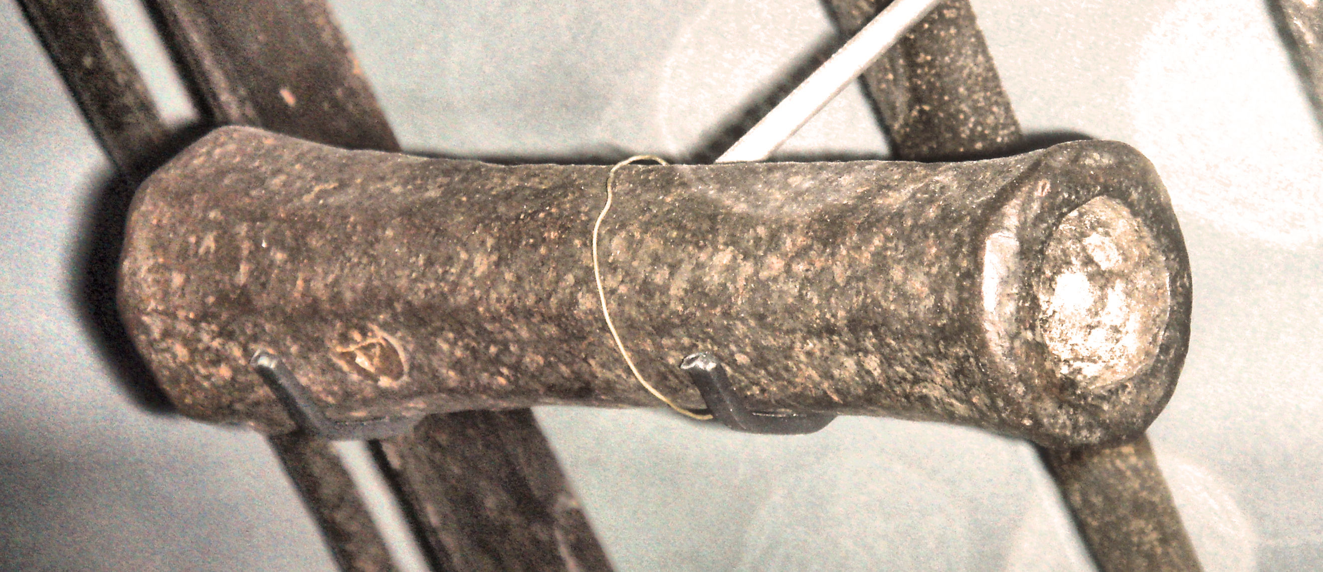 Hand Bombard Western Europe 1380